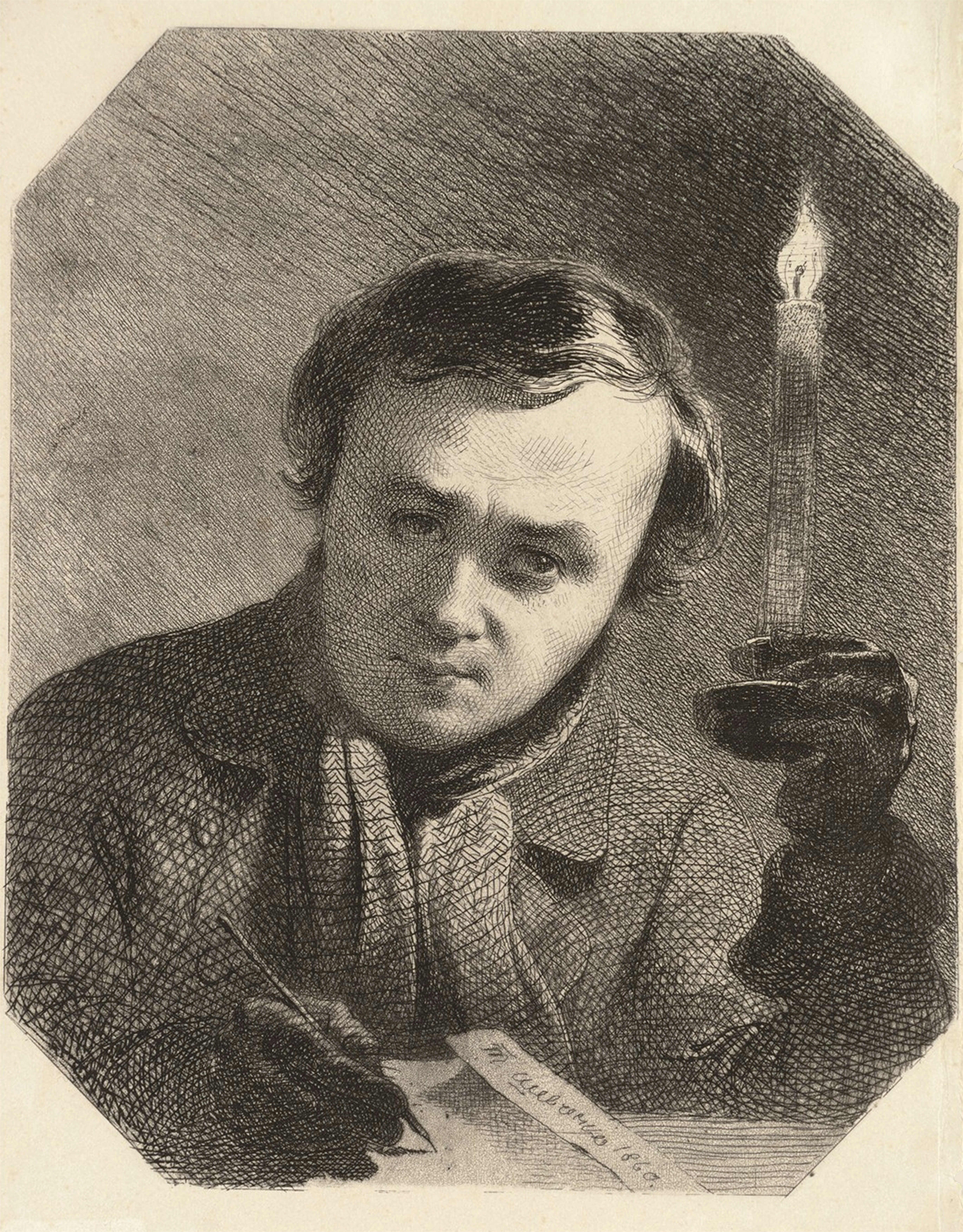 Офорт, акватинта. Створено з автопортрета 1845 р., місцезнаходження якого не встановлено.